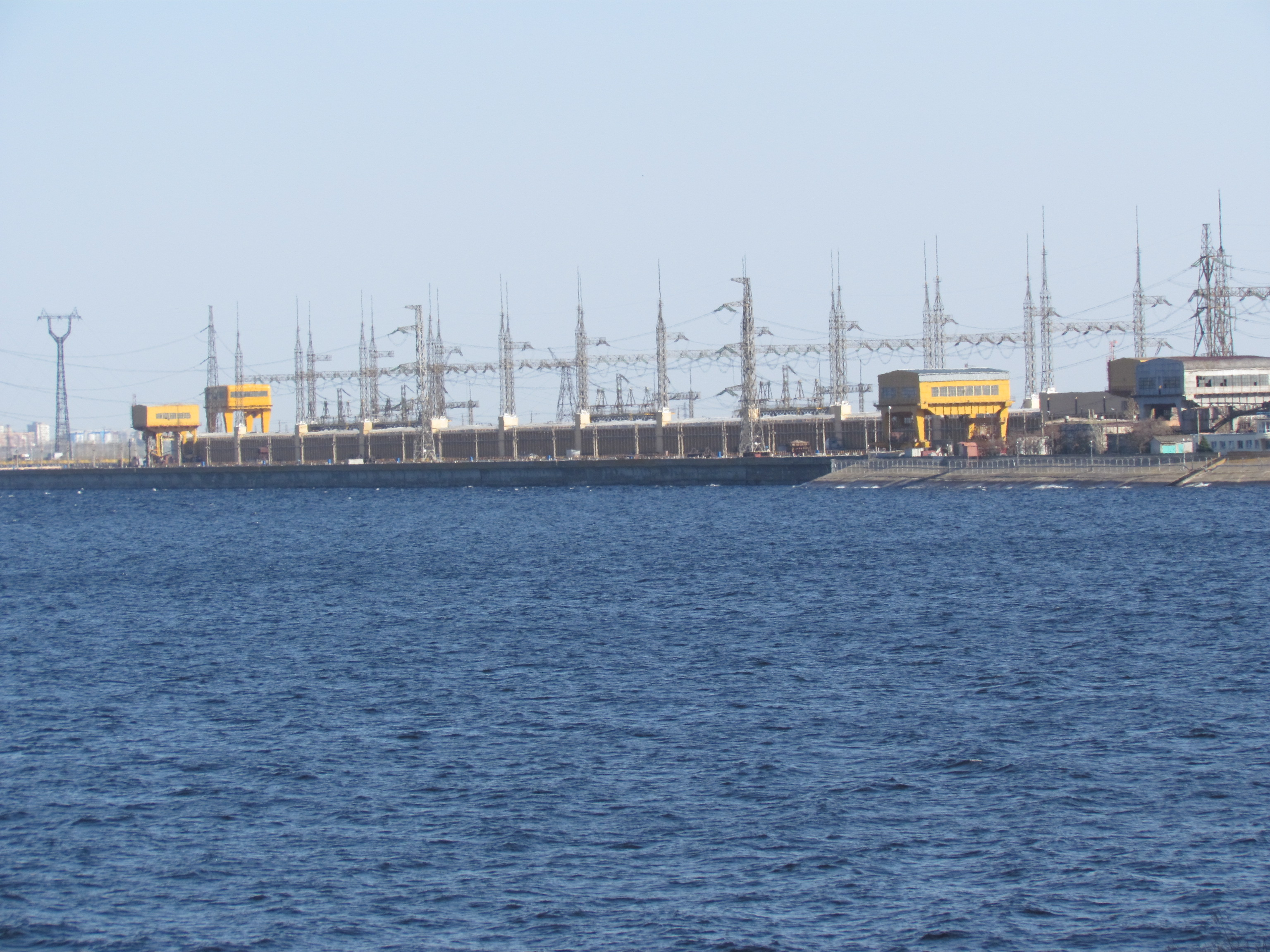 hydro power plant, volgograd